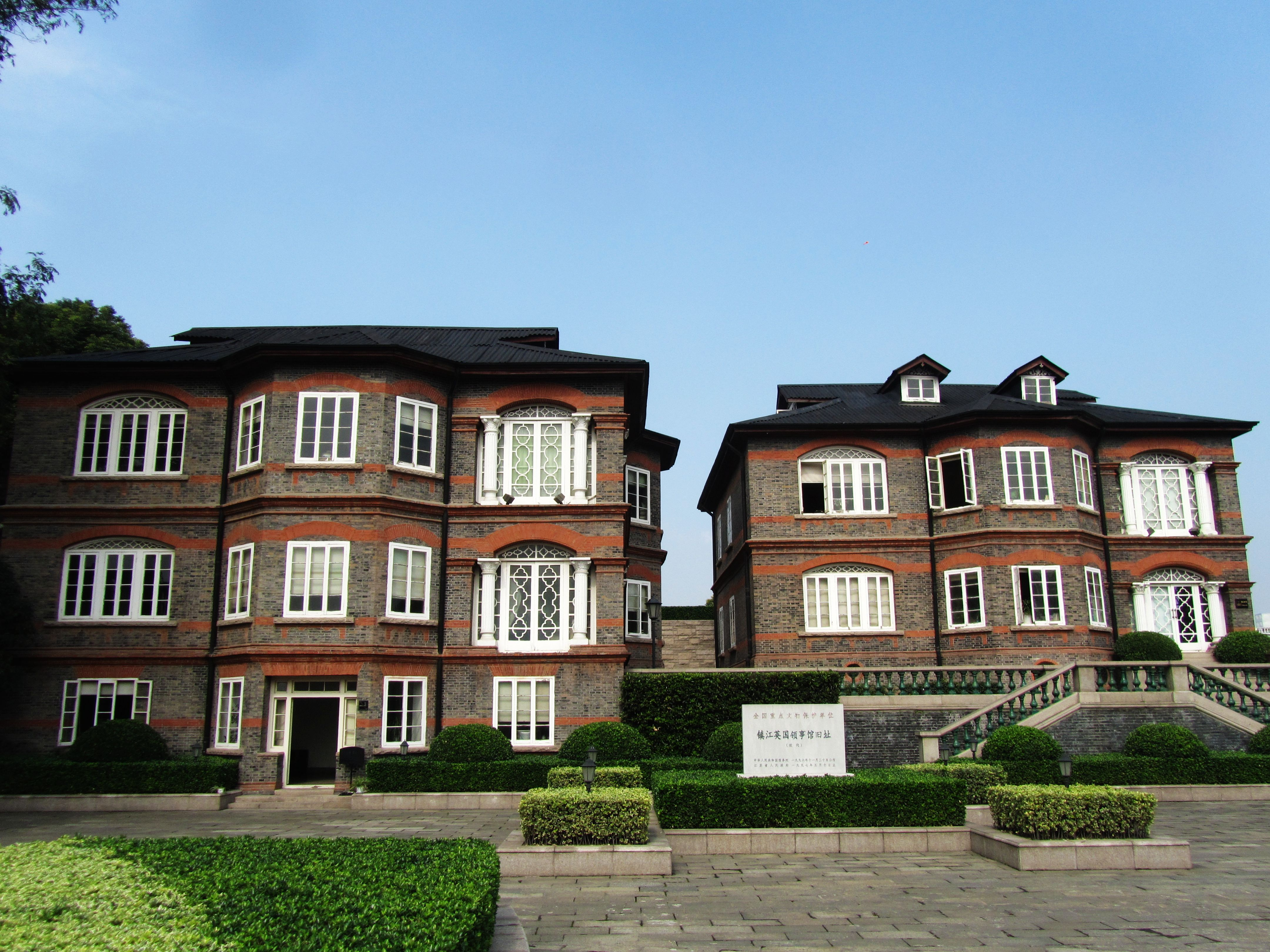 镇江英国领事馆旧址。